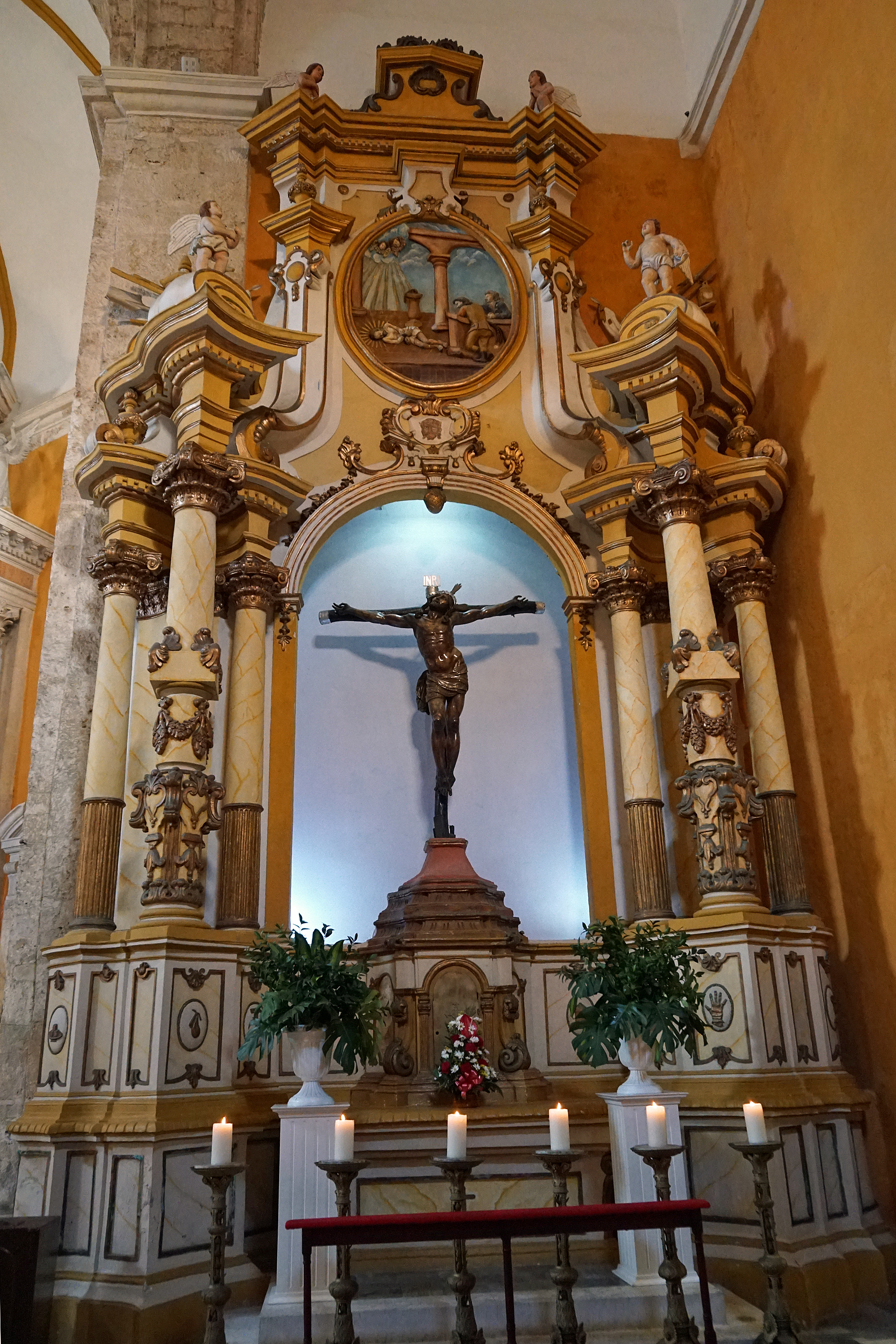 Altar Menor dedicado al Cristo de la Expiración (tallado en madera) de la Iglesia de Santo Domingo, Cartagena de Indias